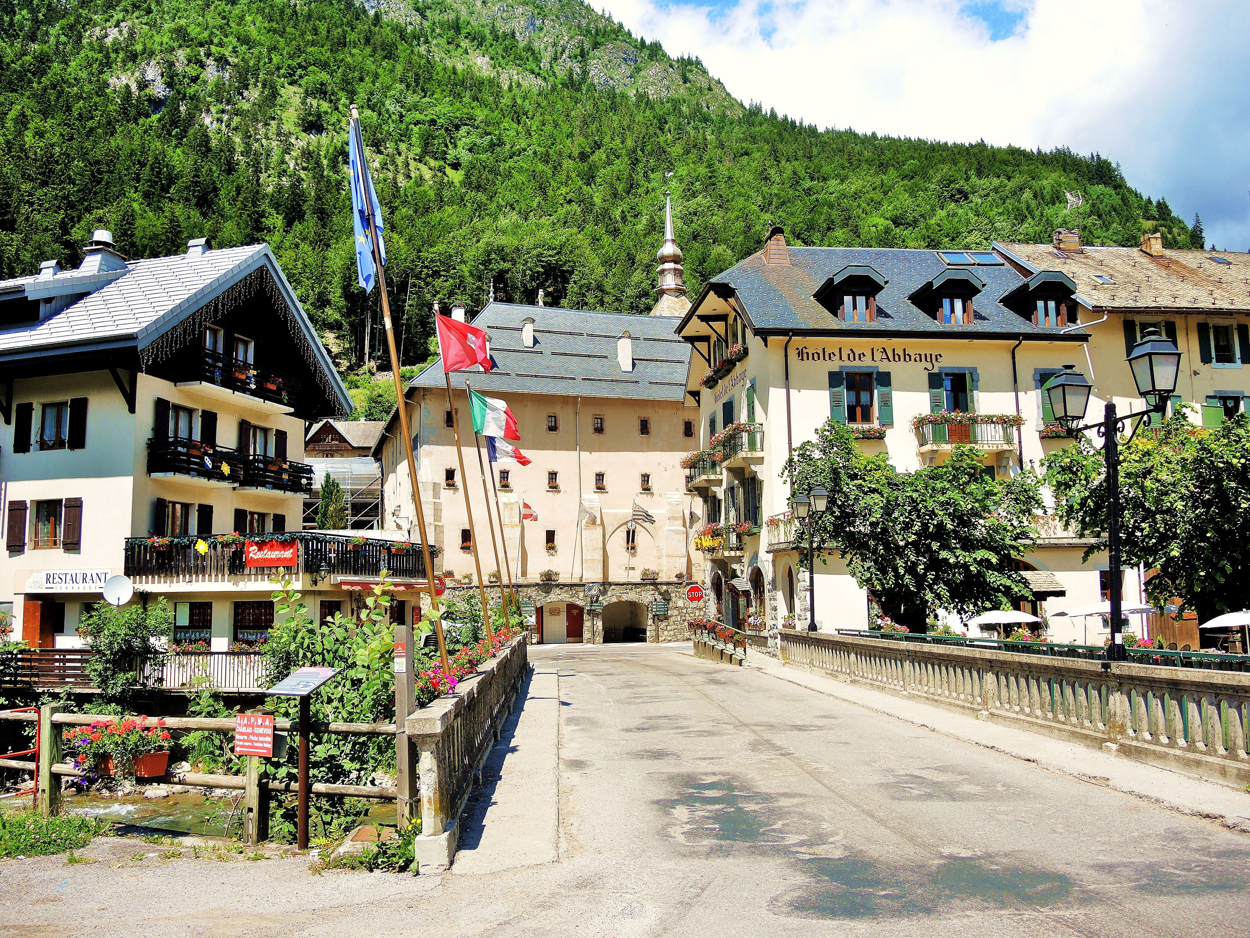 Le bourg d'Abondance, vu de l'ancien pont couvert.